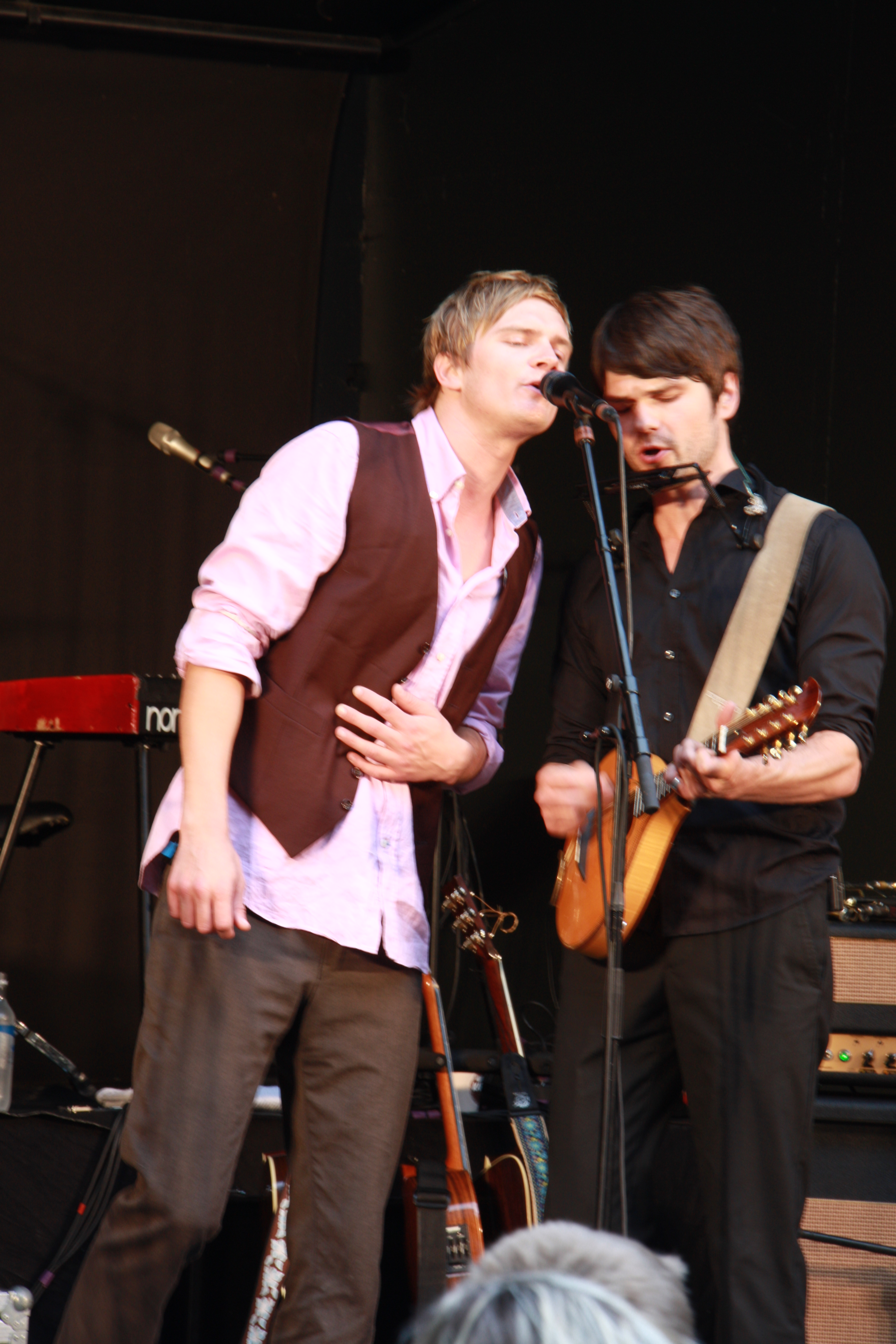 Odin Staveland og Paul Hansen i Vamp under en konsert i Søgne i 2011